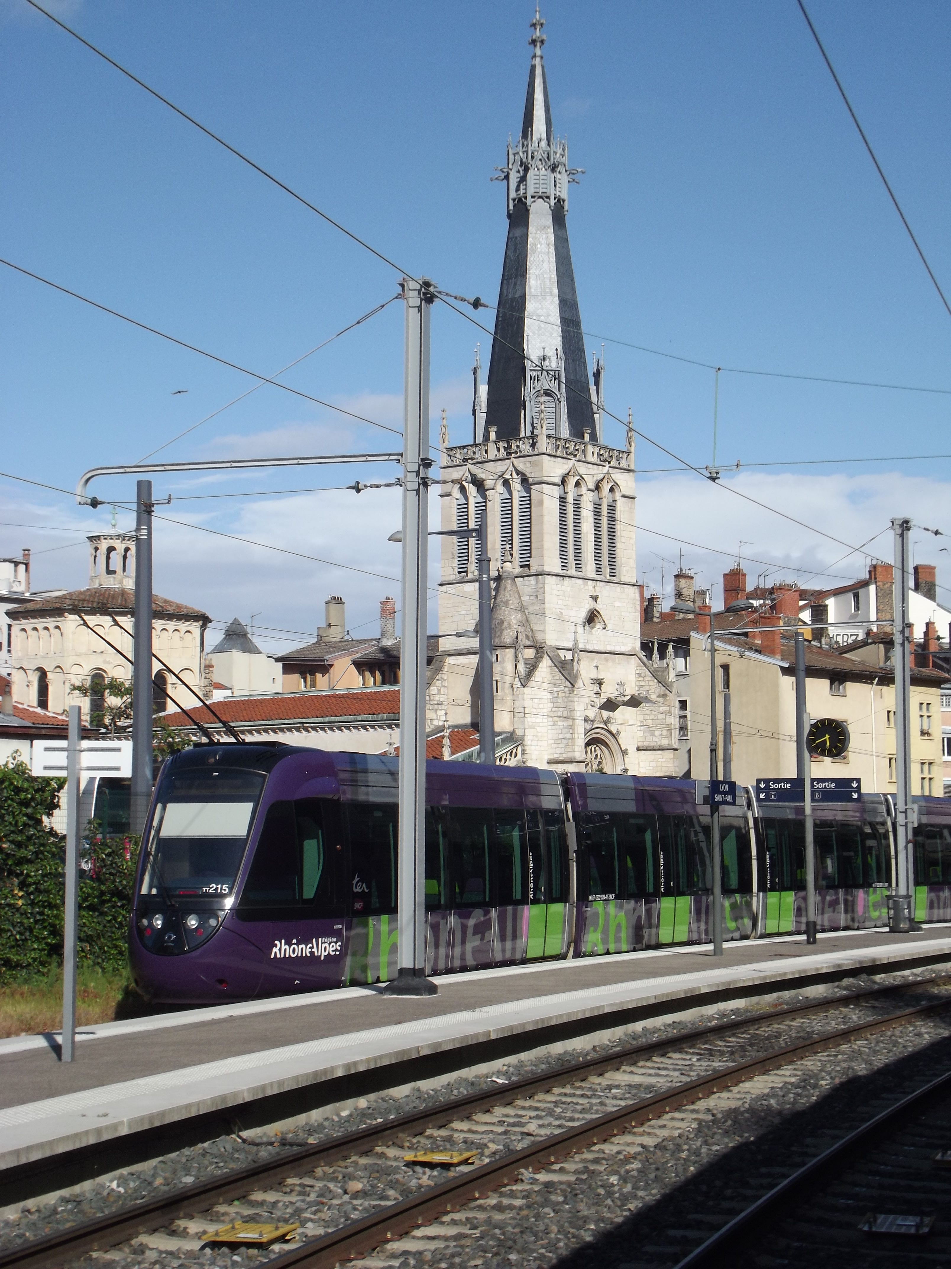 Tram-trein in Lyon Saint-Paul met lage zon